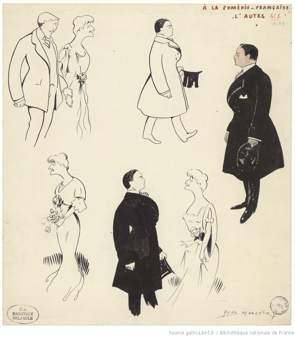 Georges Grand, Berthe Cerny et Marcel Dessonnes dans "L'autre" de Paul et Victor Margueritte